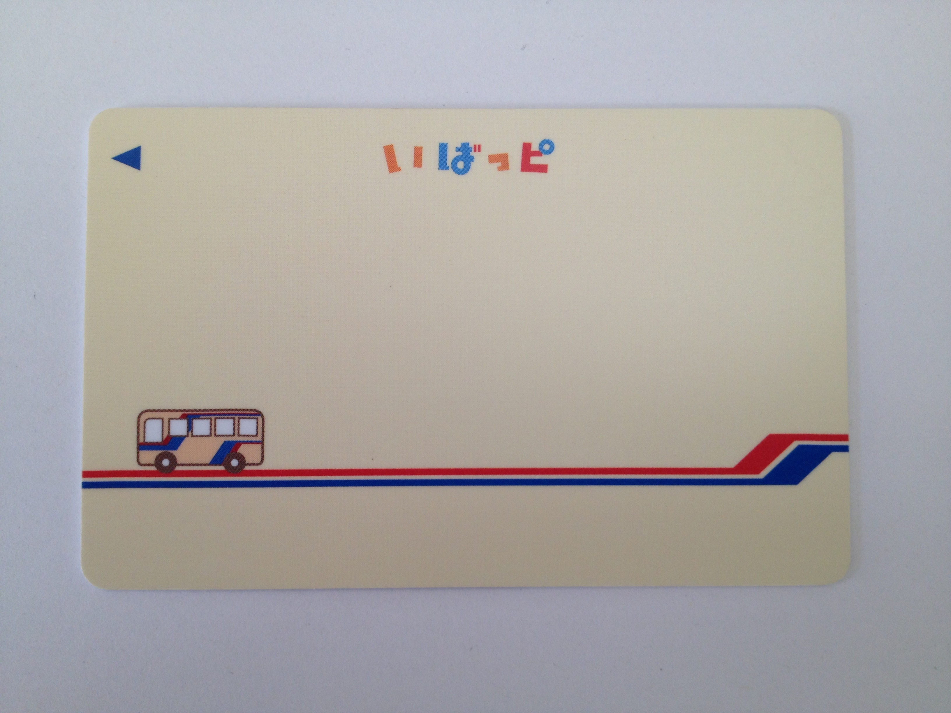 いばっピ（表面）